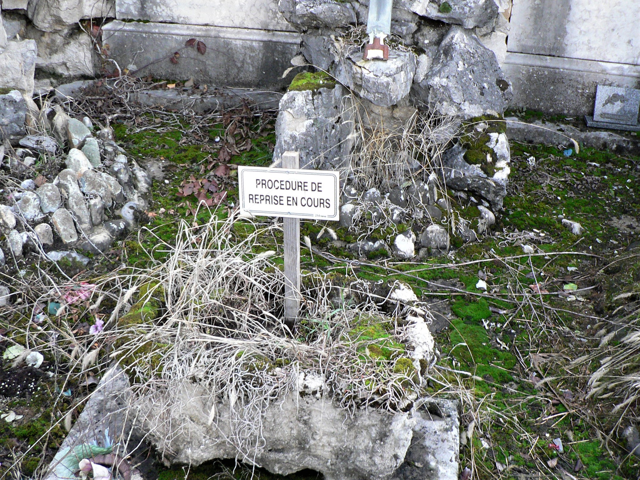 Tombeau avec "procedure de reprise en cours", au cimetière du Mas de l'église, en proximité de l'église de Chonas. La Terrasse, Isère, AuRA, France.